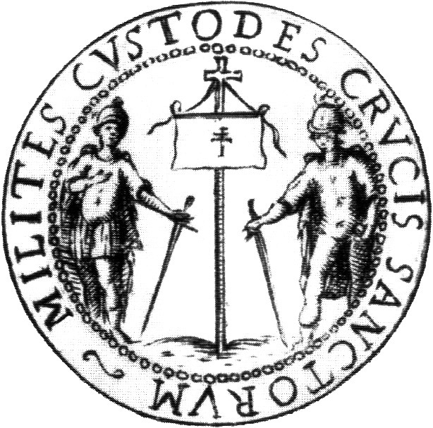 Simbolo della Compagnia dei Custodi delle Sante Croci